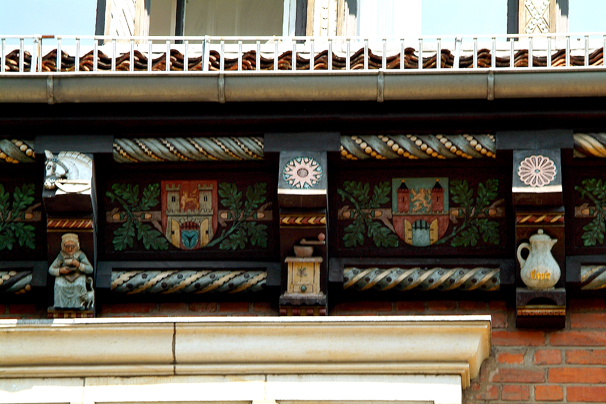 Breite Straße 10, Hannover: Knaggen und Füllbretterschmuck, am Grotehaus, hier eine Kaffee-trinkende alte Frau mit Katze, eine Kaffeemühle und eine Kanne mit goldener Aufschrift "Grote", dazwischen die Wappen von Hannover und Braunschweig ...